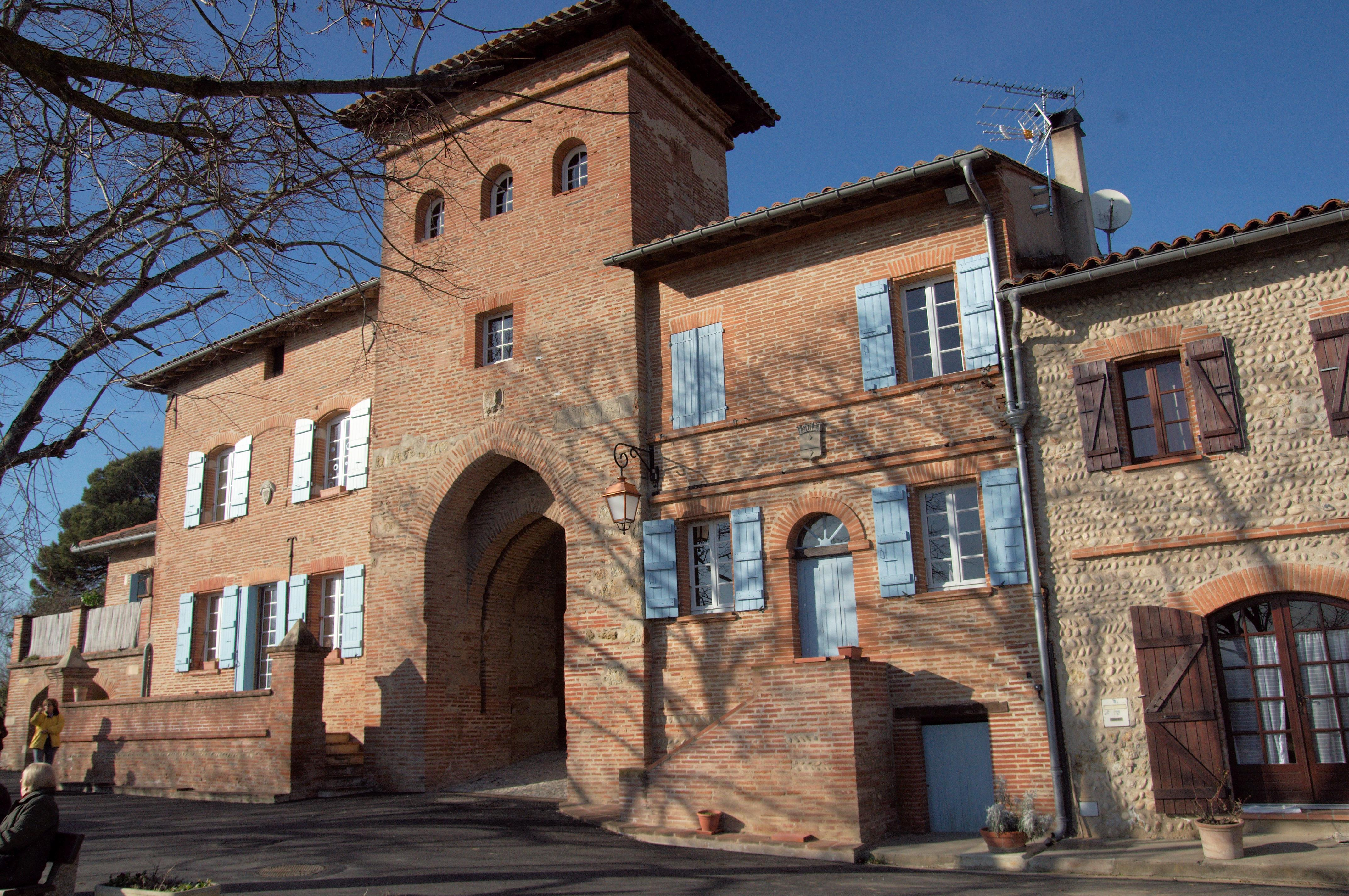 Porte du fort du village de Clermont-le-Fort (Haute-Garonne, France).